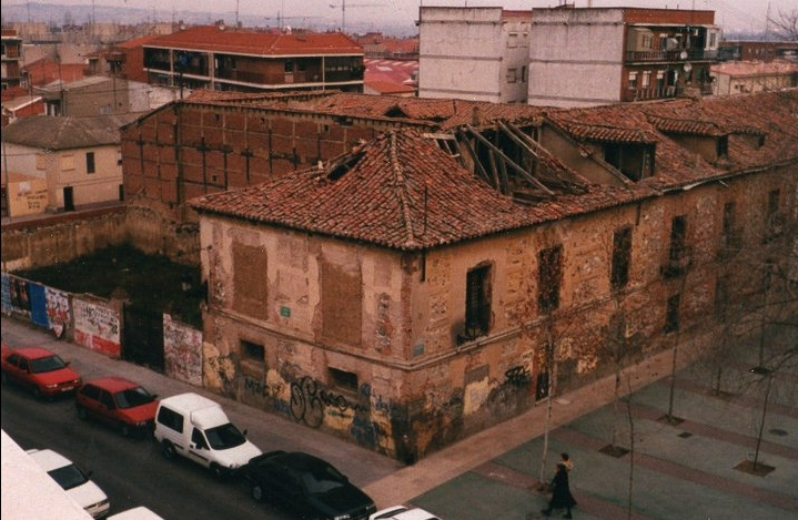 A finales de los 90 la plaza se derrumbaba lentamente.